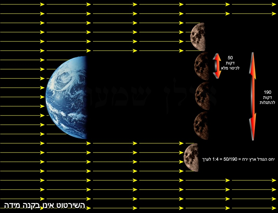 האופן בו מדד אריסטארכוס את יחס הגדלים בין הארץ לירח.